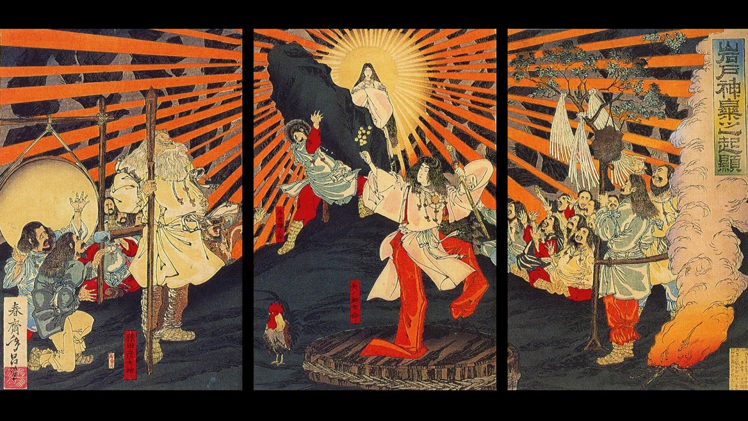 Amaterasu.